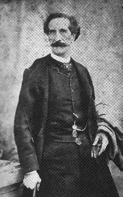 Cesare Sighinolfi (1833-1902) scultore italiano